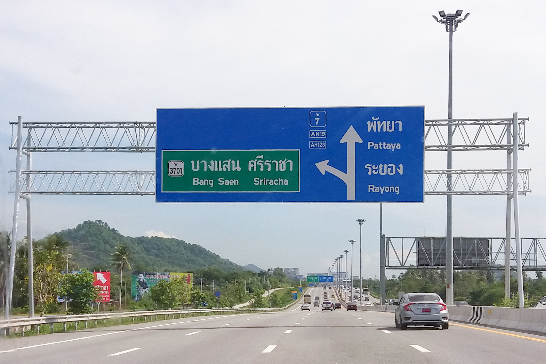 Head to Pattaya